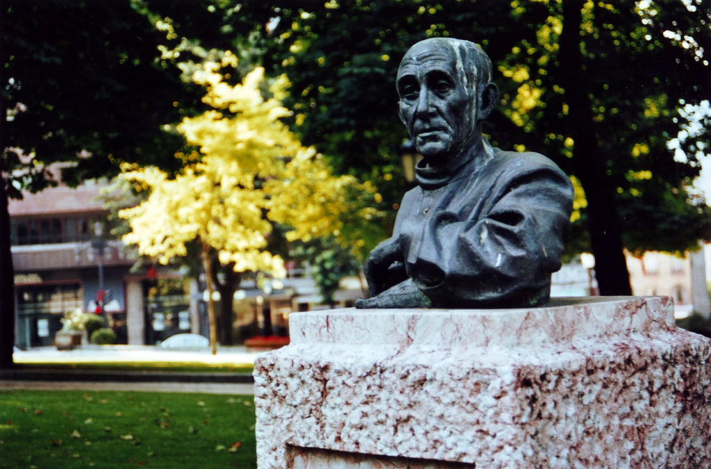 Busto del pintor ovetense Paulino Vicente (Padre) de Félix Alonso Arena (1988). Me gusta esta foto por la luz de los árboles del fondo. Y el "regalo" de las palomas le da un toque del paso del tiempo.